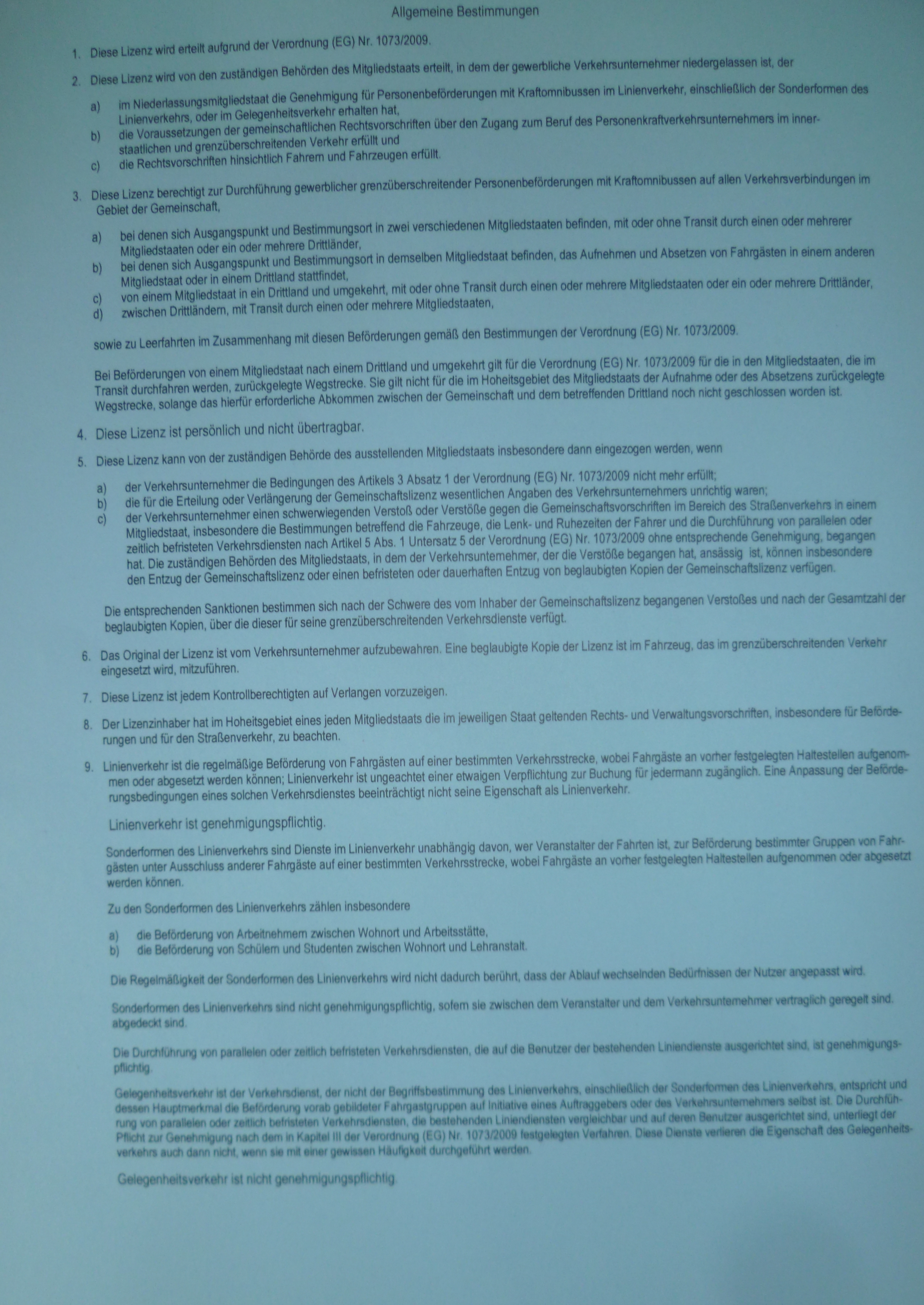 Allgemeine Bestimmungen der EU-Gemeinschaftslizenz für den gewerblichen grenzüberschreitenden Personenverkehr mit Kraftomnibussen